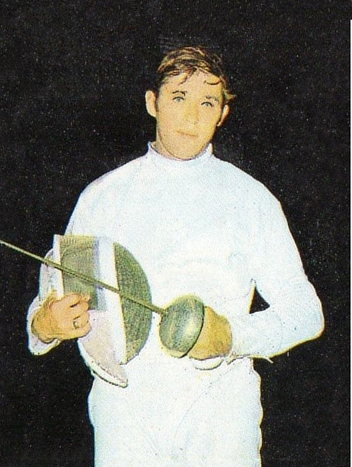 MUNCHEN/MONACO '72-PANINI-Figurina n.33- KRISS - URSS - SCHERMA -Rec